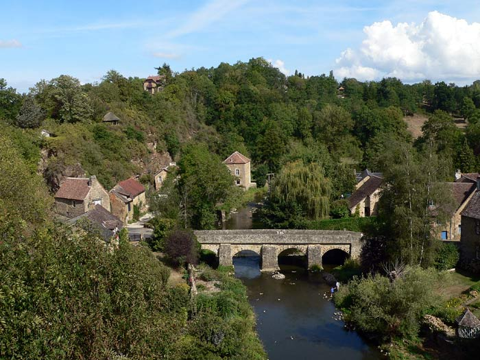 le pont de St Céneri vu depuis l'église